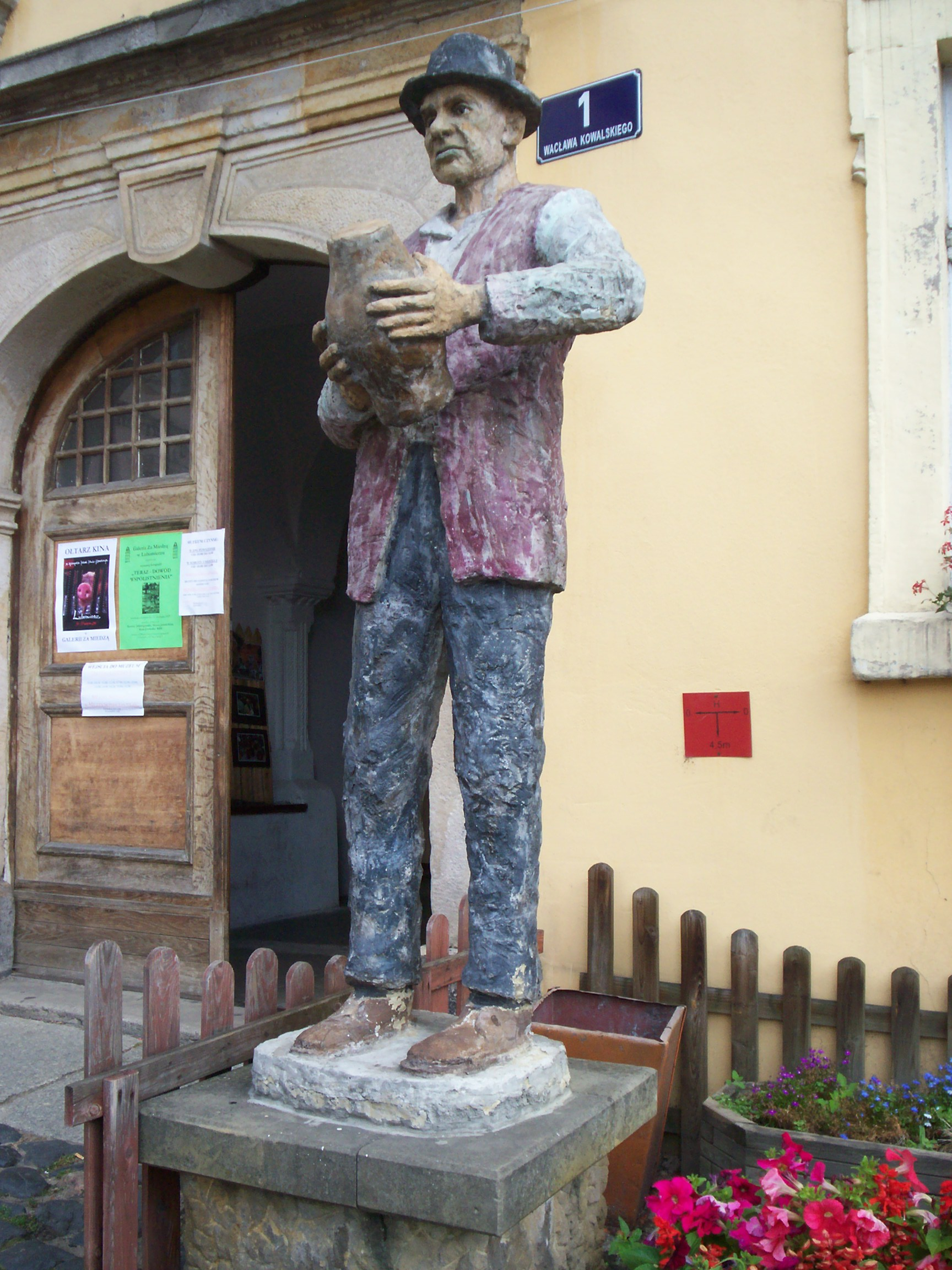 Lubomierz, muzeum Kargula i Pawlaka.